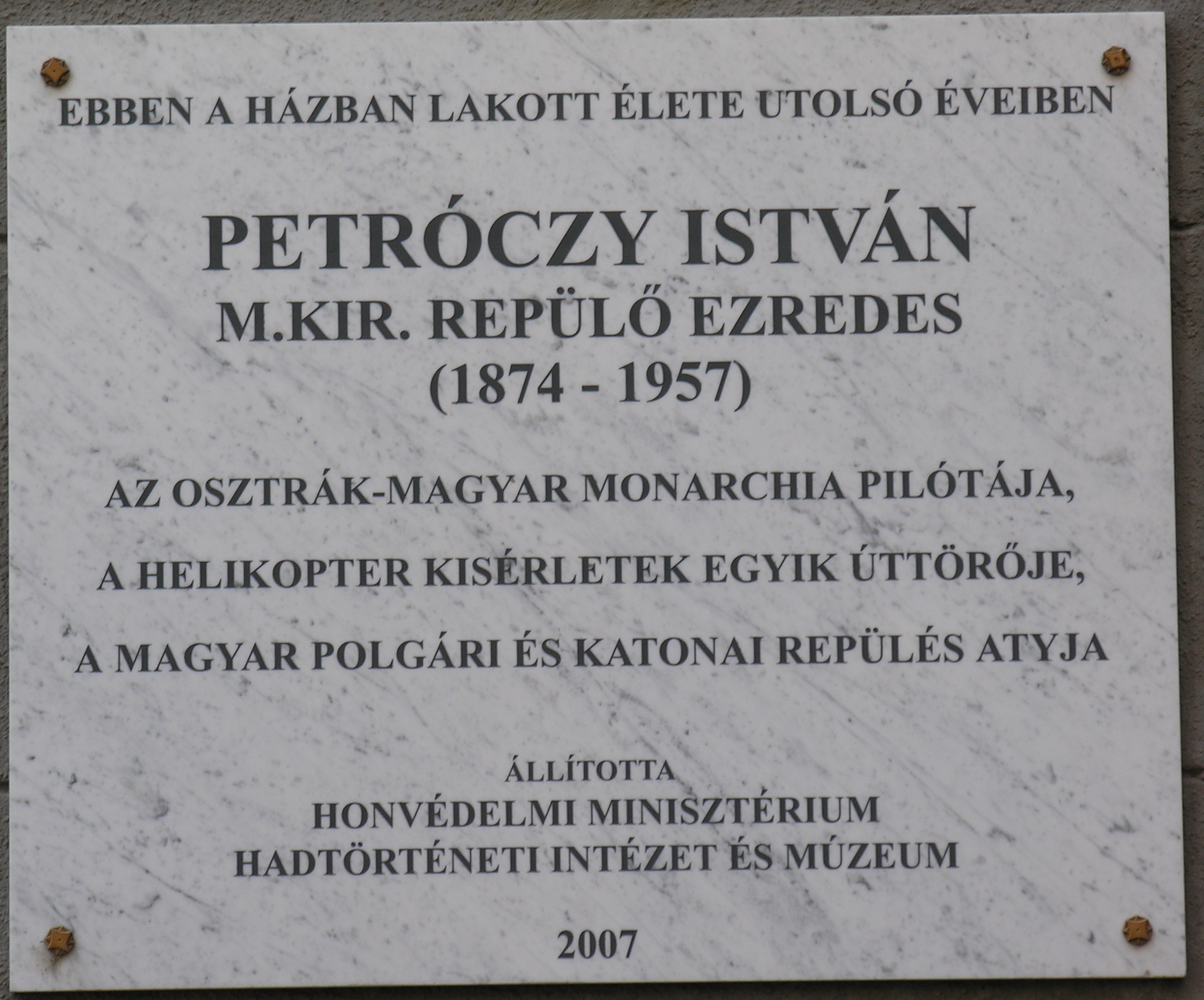 Petróczy István emléktáblája. Budapest, XI., Budafoki út 20. (Lágymányosi utcai oldalon).